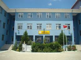 Çanakkale Fen Lisesi binası